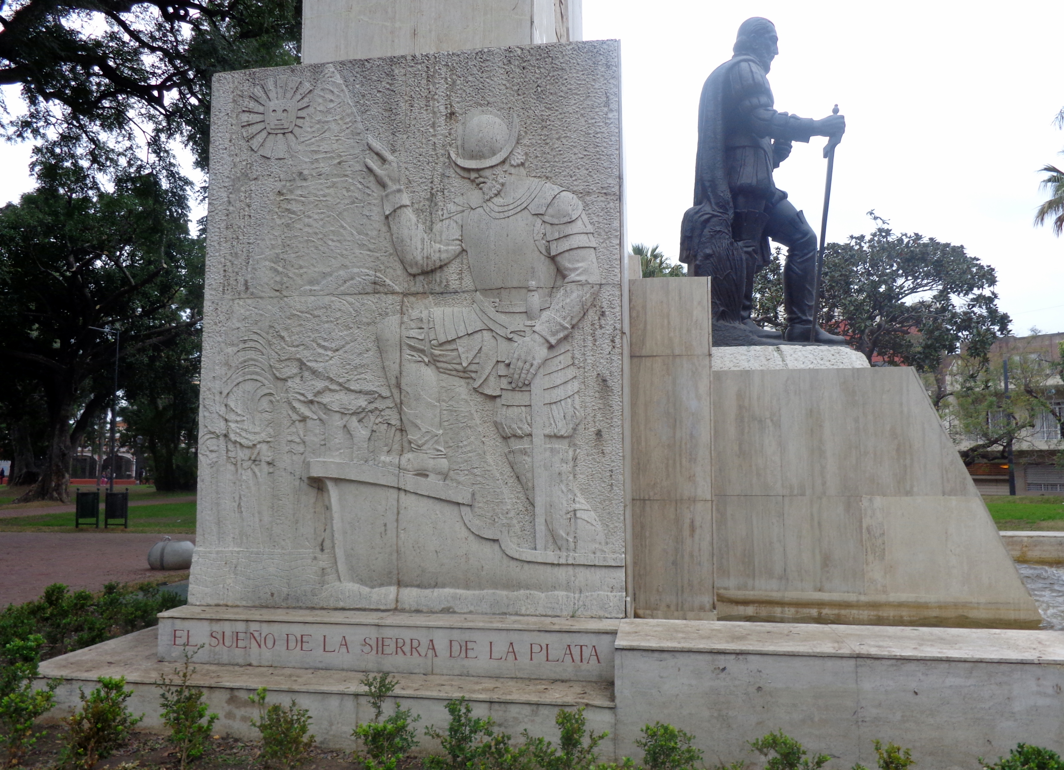 Monumento obra de Juan Carlos Oliva Navarro, inaugurado el 23 de junio de 1937. En Parque Lezama, San Telmo, Buenos Aires, Argentina.